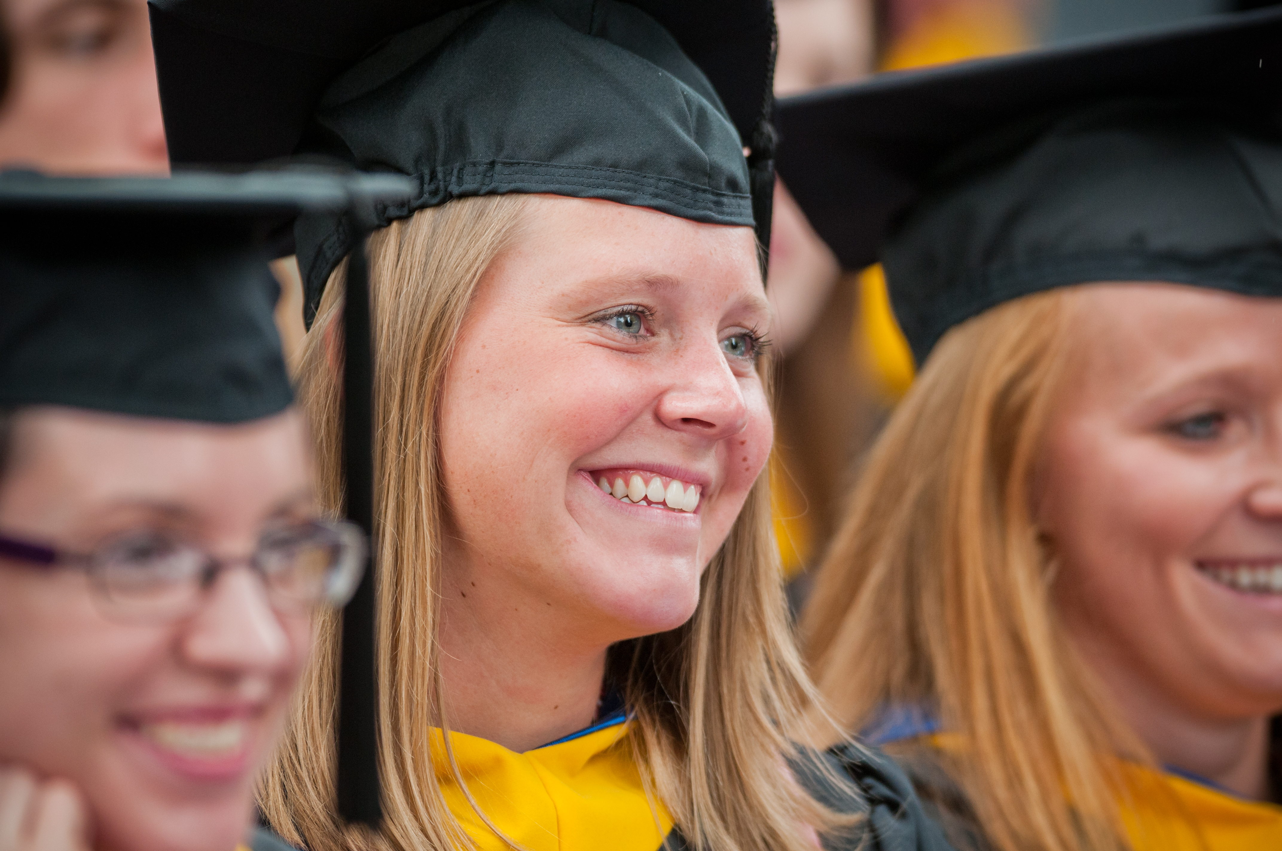 Commencement 2012